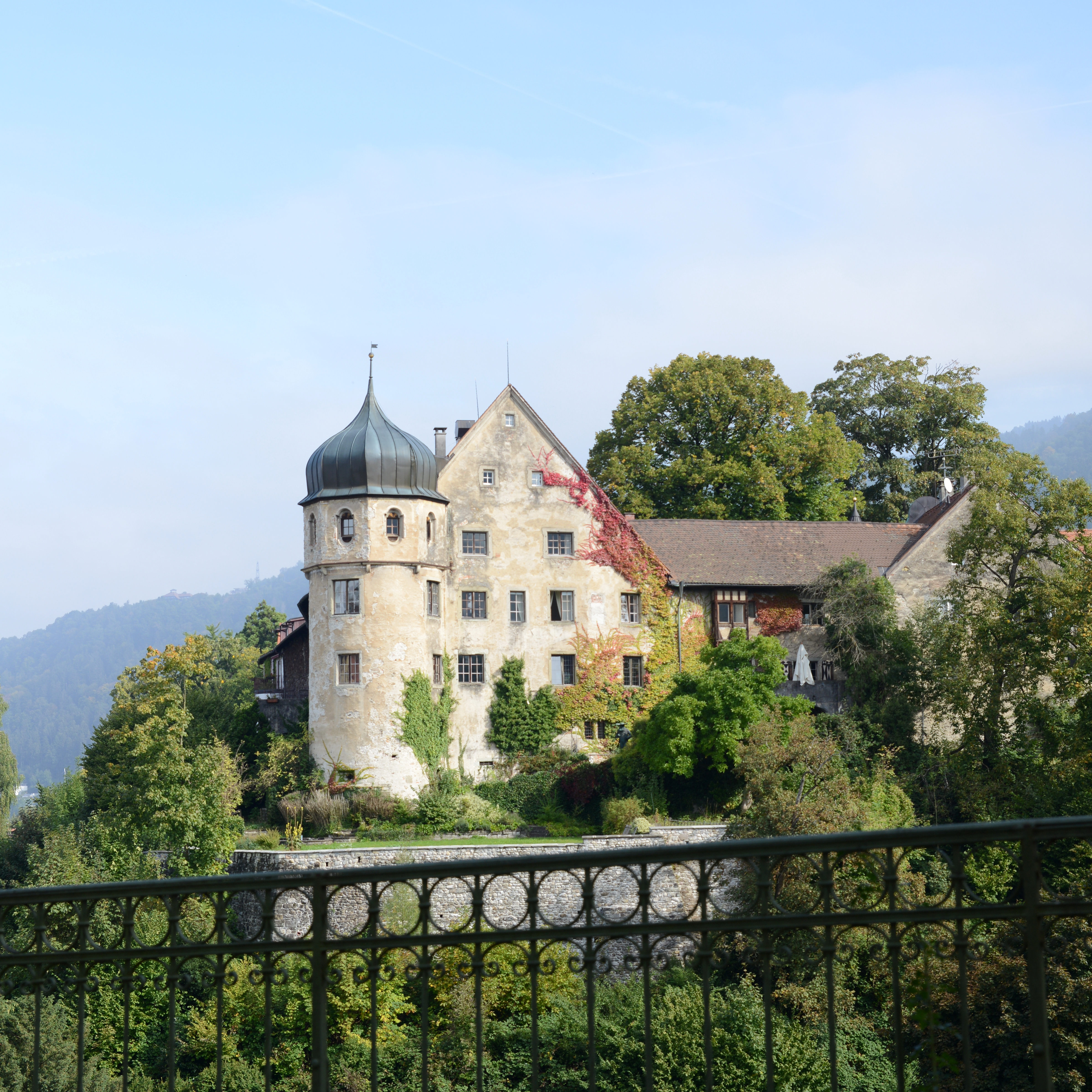 Ehregutaplatz Nr.4, Gourmet Hotel Deuring Schlössle in der Oberstadt von Bregenz.